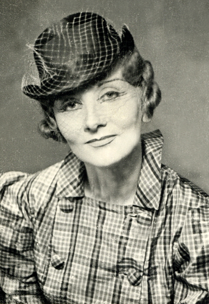 Ivan Cankar, Za narodov blagor, Narodno gledališče v Ljubljani. Na fotografiji: Sava Sever (Helena).